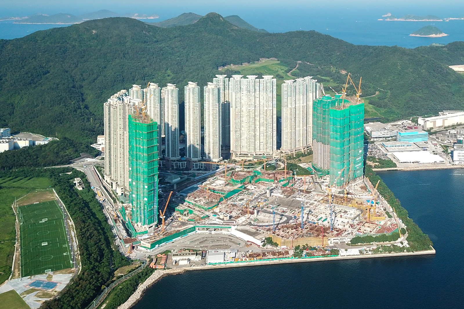 LOHAS Park Overview